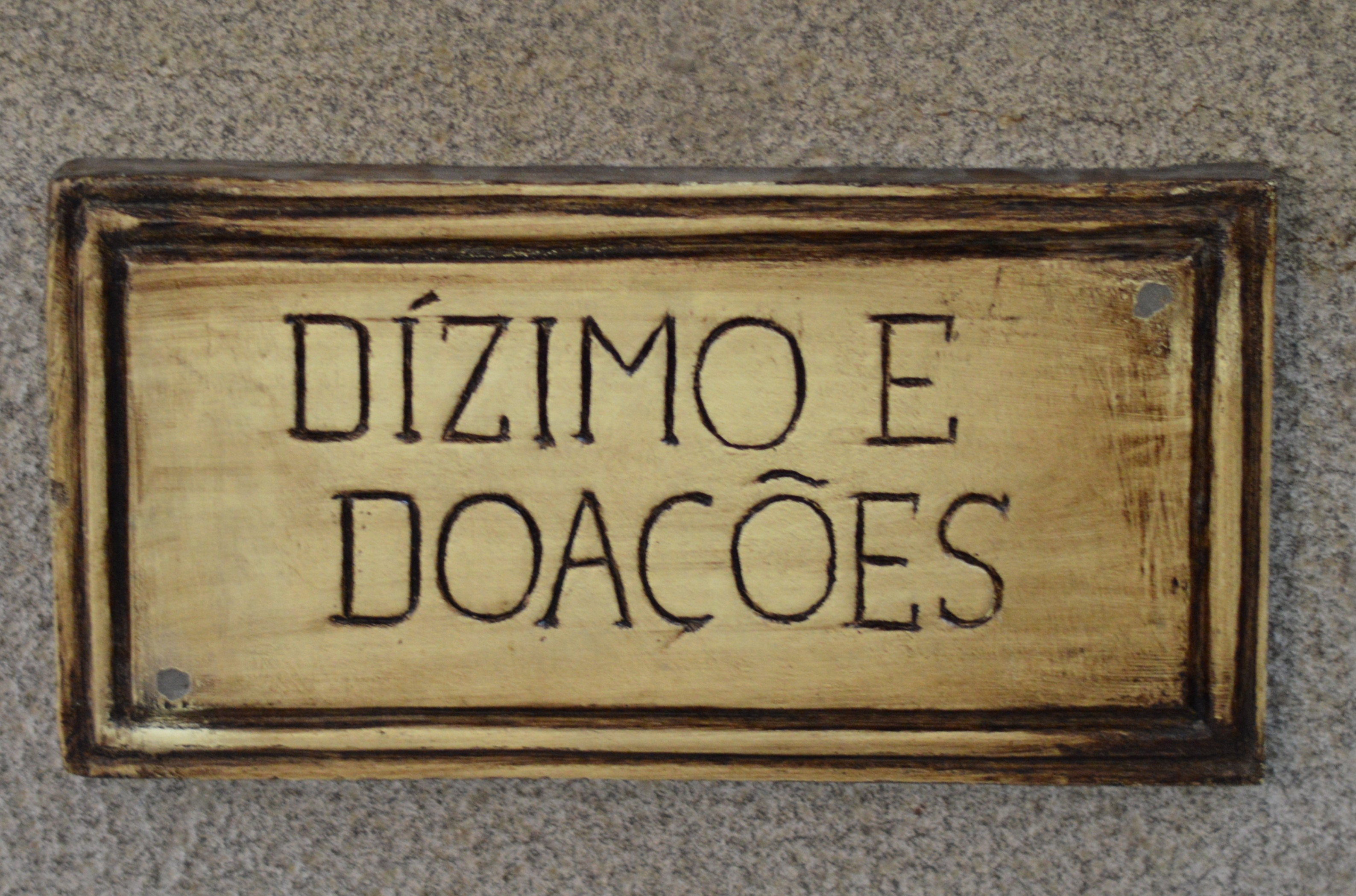 Plana de dízimo e doações na Igreja São Pedro em Gramado